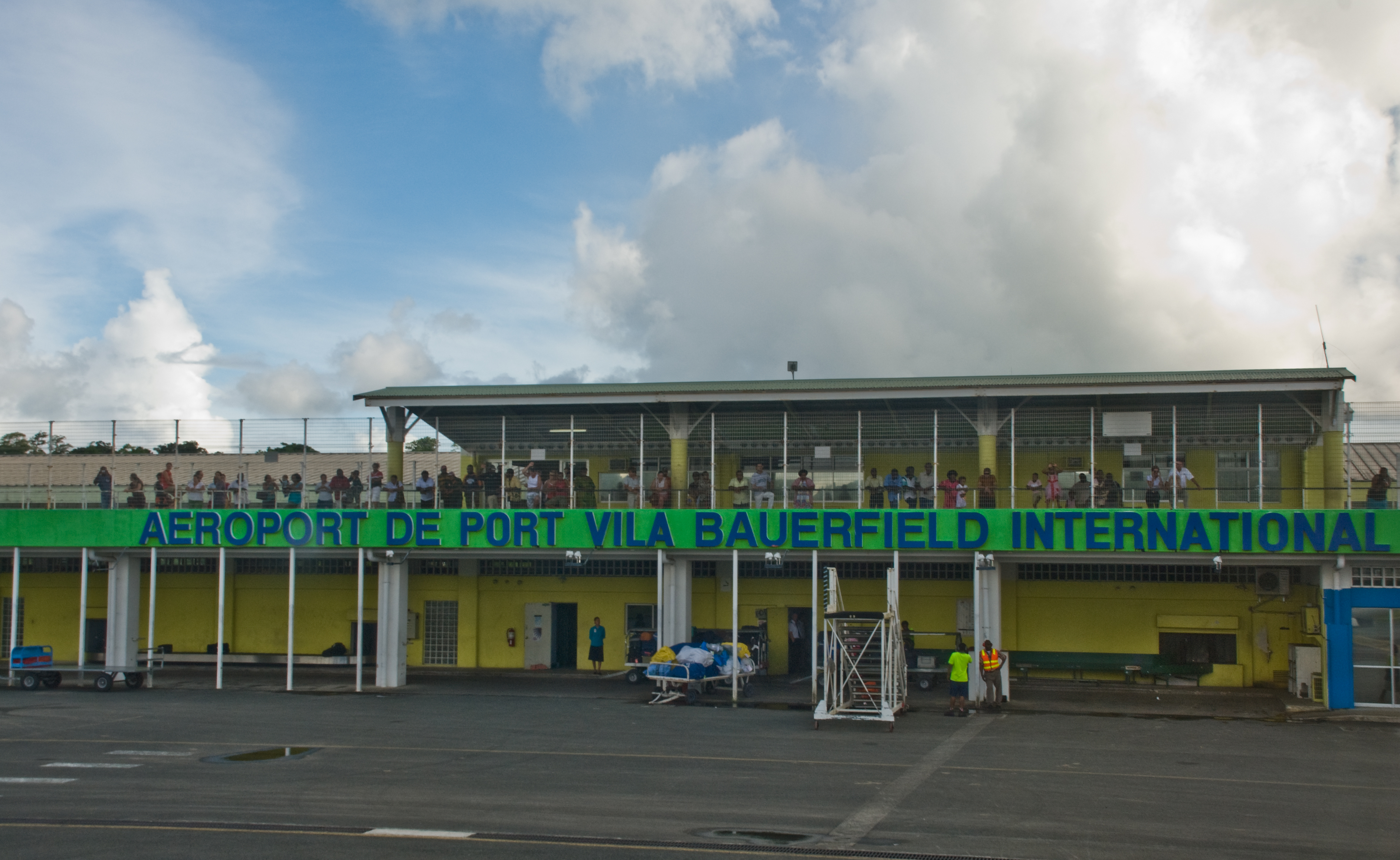 International terminal, Port Vila Airport, Vanuatu, April 2008